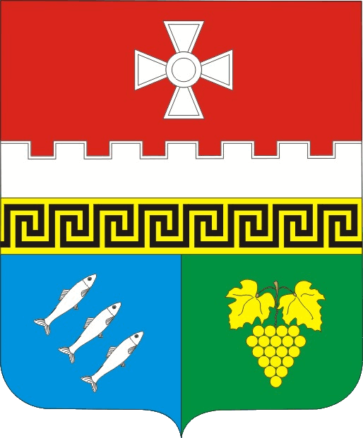 Герб Балаклави